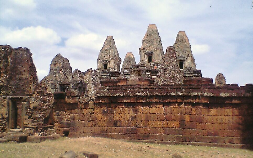 平成18年5月、投稿者撮影、プレループの全景